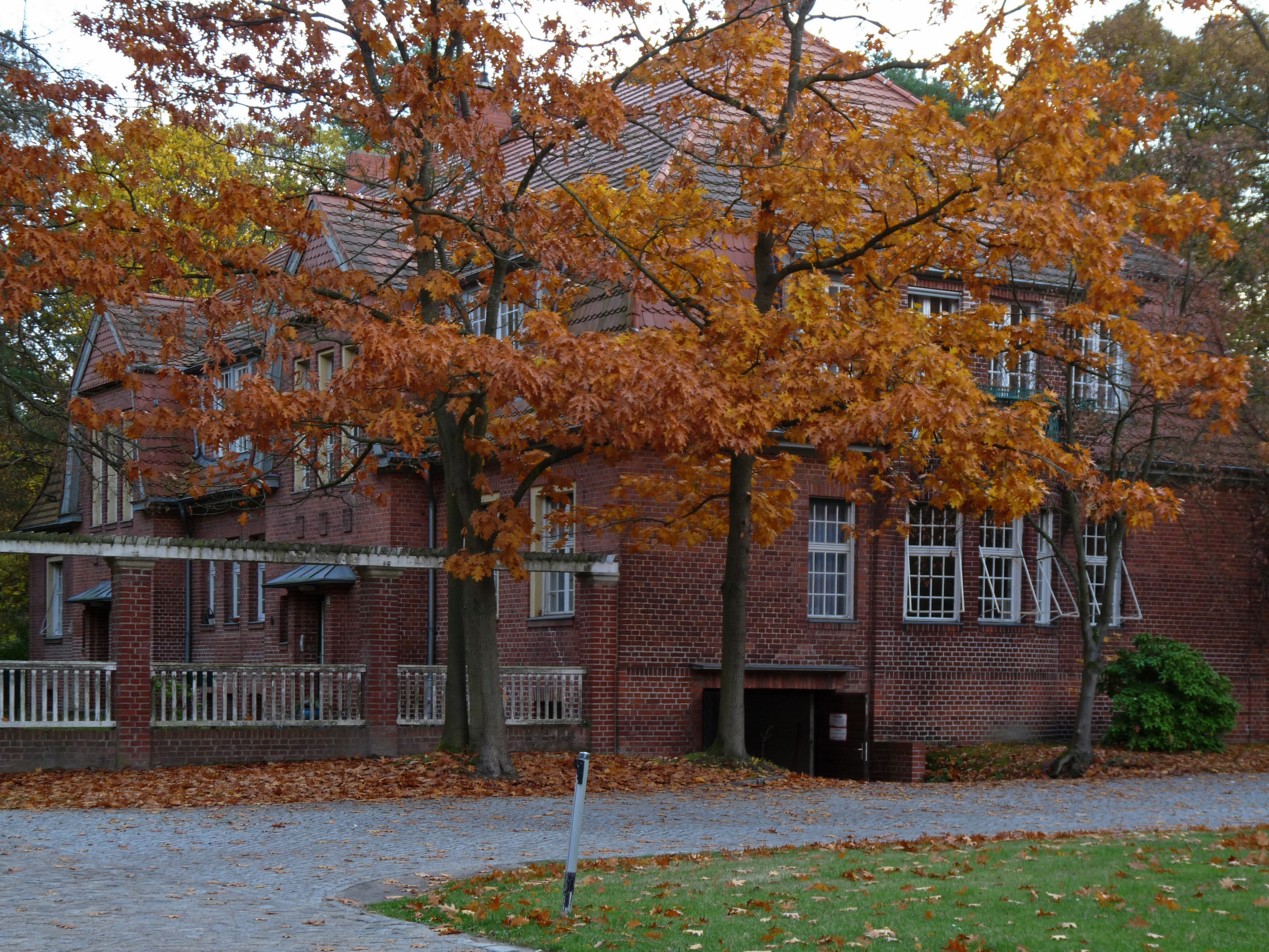 Gelände der Asklepios-Klinik Brandenburg